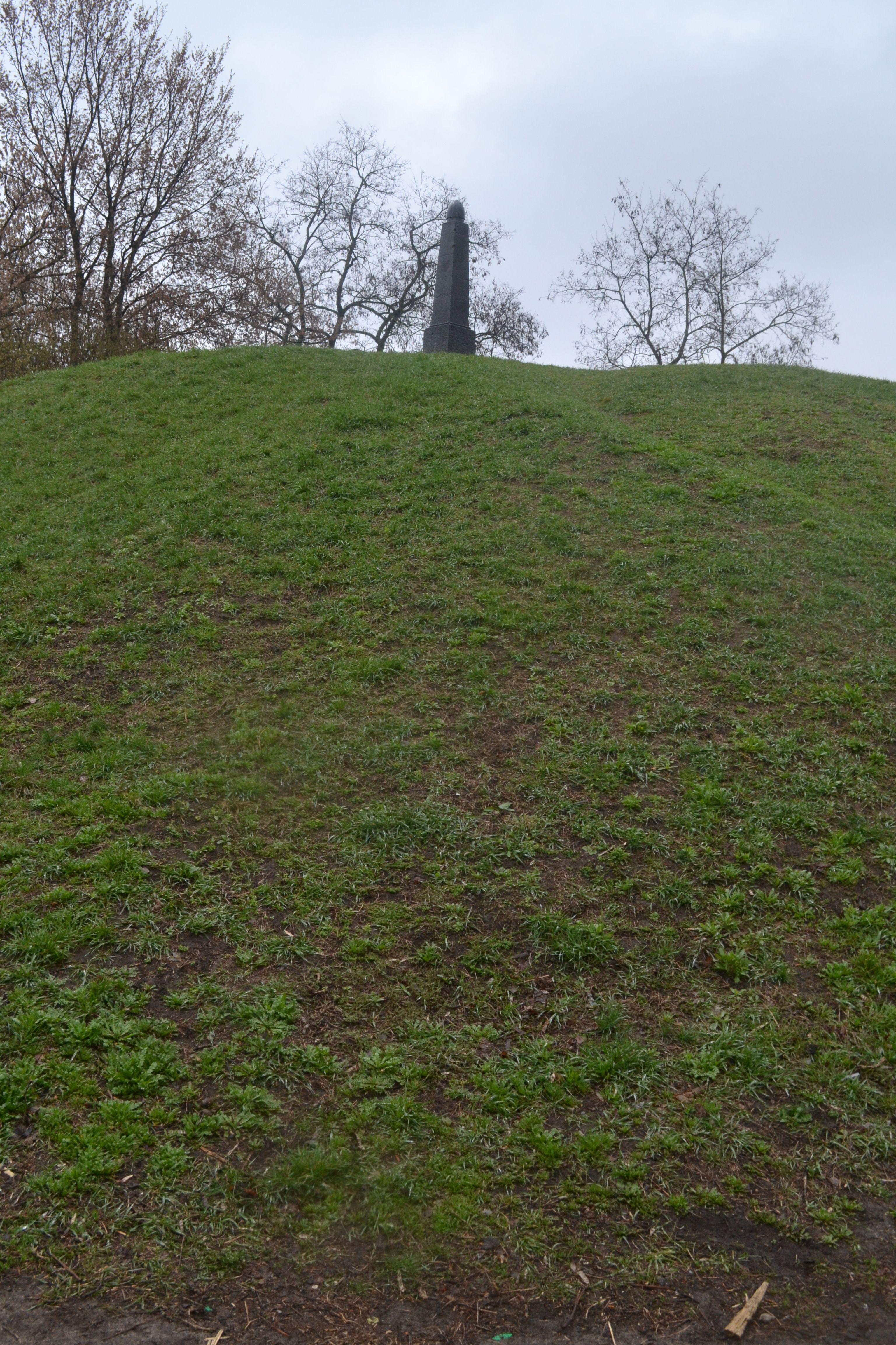 Курган «Чорна Могила», Чернігів, вул. Князя Чорного, 4